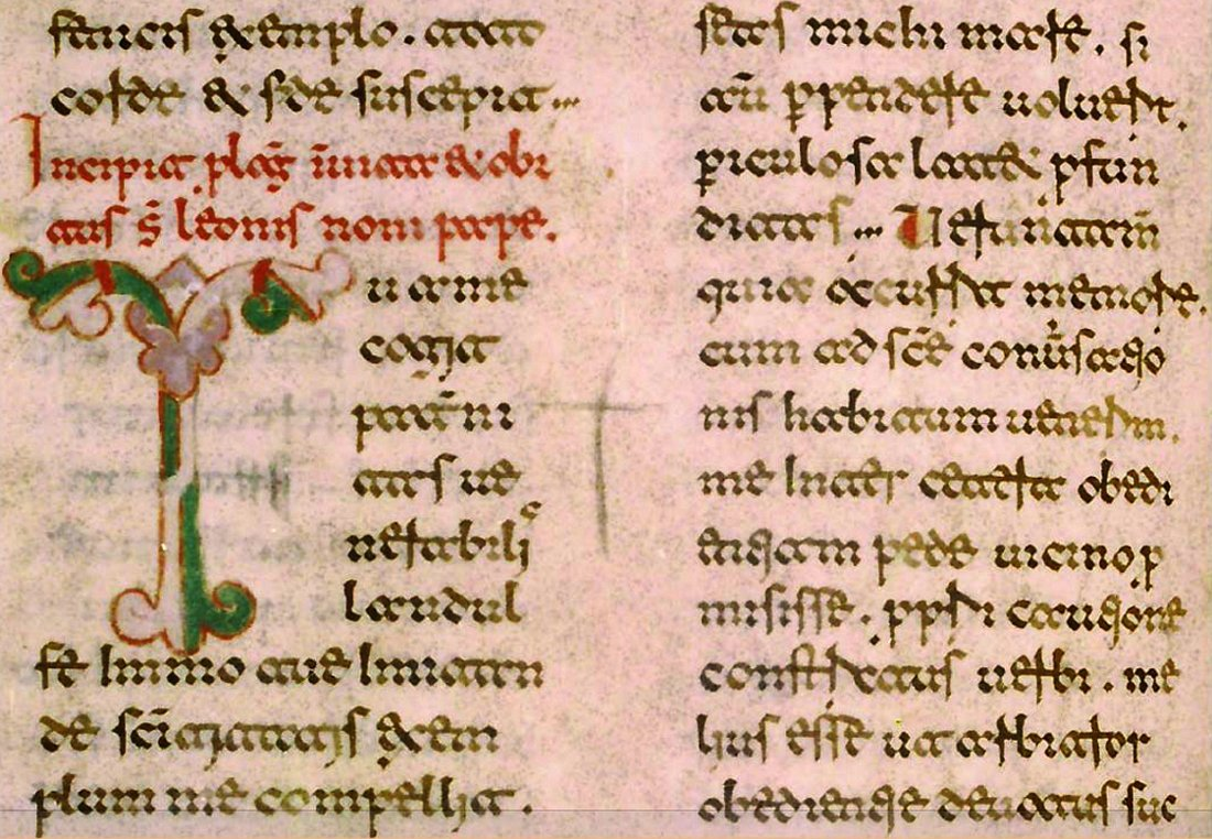 Benevento, Biblioteca Capitolare, Codice 4, f52v, Vita di Leone IX